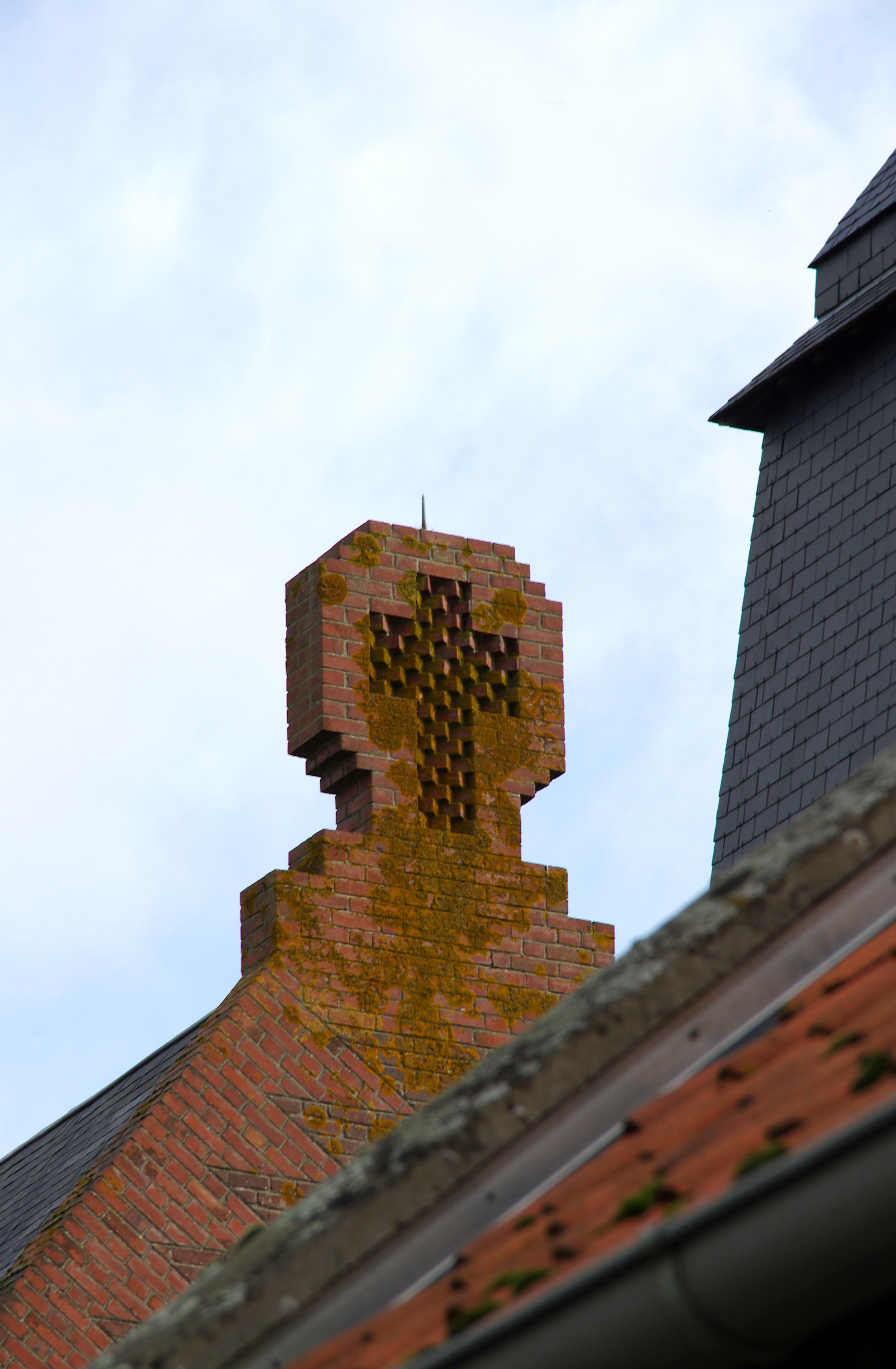 Villers-lès-Roye (Somme, France) - Croix ornant le sommet de la façade de l'église Saint-Rémi. Intéressant traitement du motif de la croix, par les briques, dont l'angle constitue une surface en "pointes de diamant". Cette forme de croix rappelle la croix inscrite dans un cercle (croix nimbée) et pourrait être aussi une interprétation moderne de la "croix en raquette". .